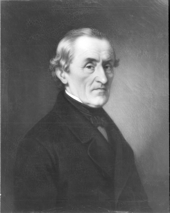 Johannes von Kuhn; Gemälde in der Professorengalerie der Eberhard Karls Universität Tübingen; Öl auf Leinwand, 62 cm x 49,8 cm